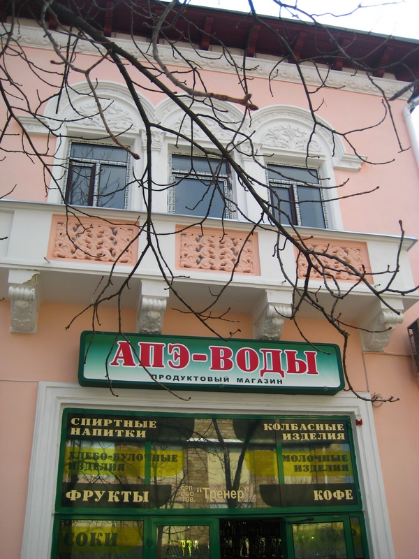 Здесь торговал Бачкуринский